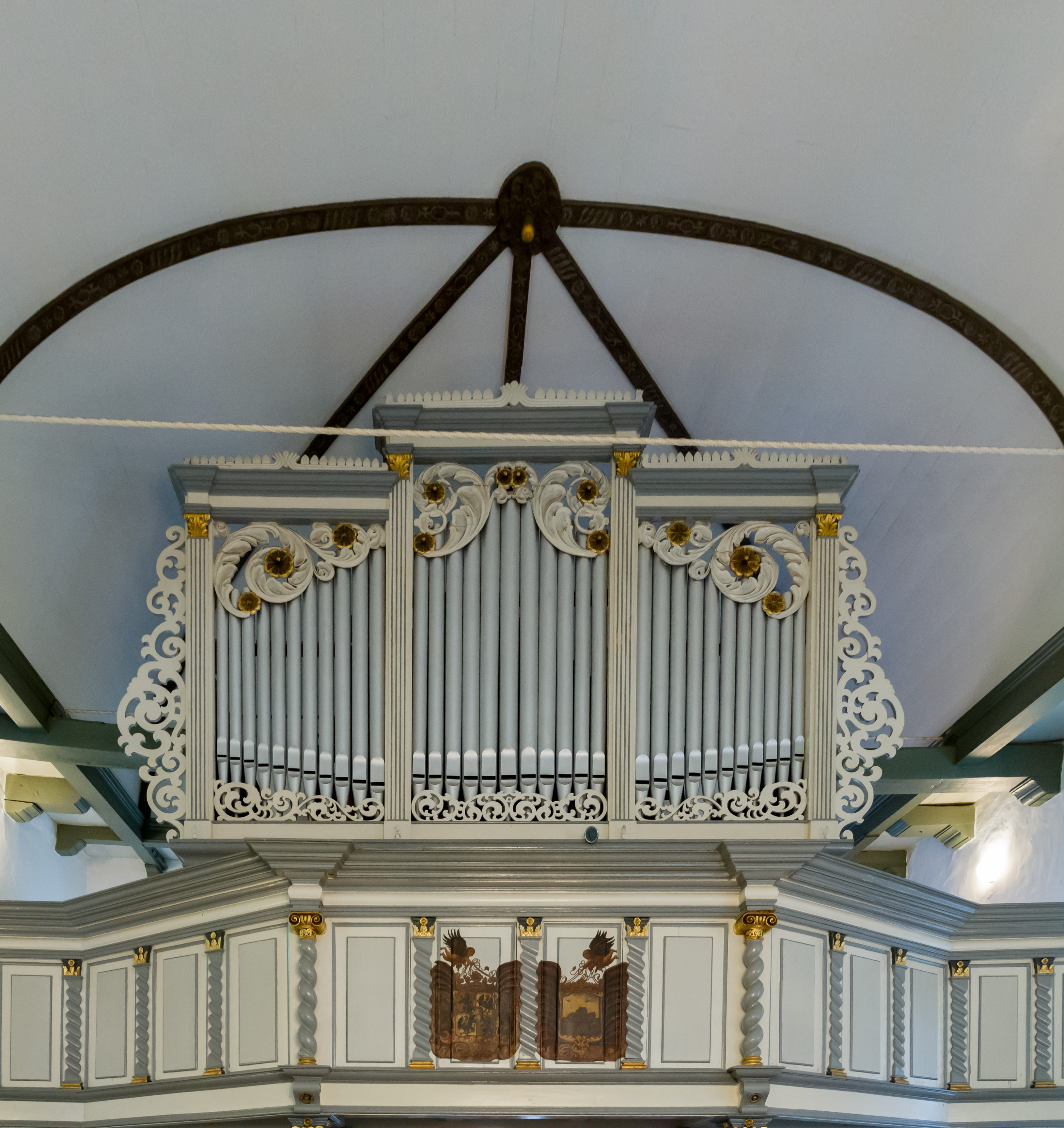 Bargeburer Church - interior